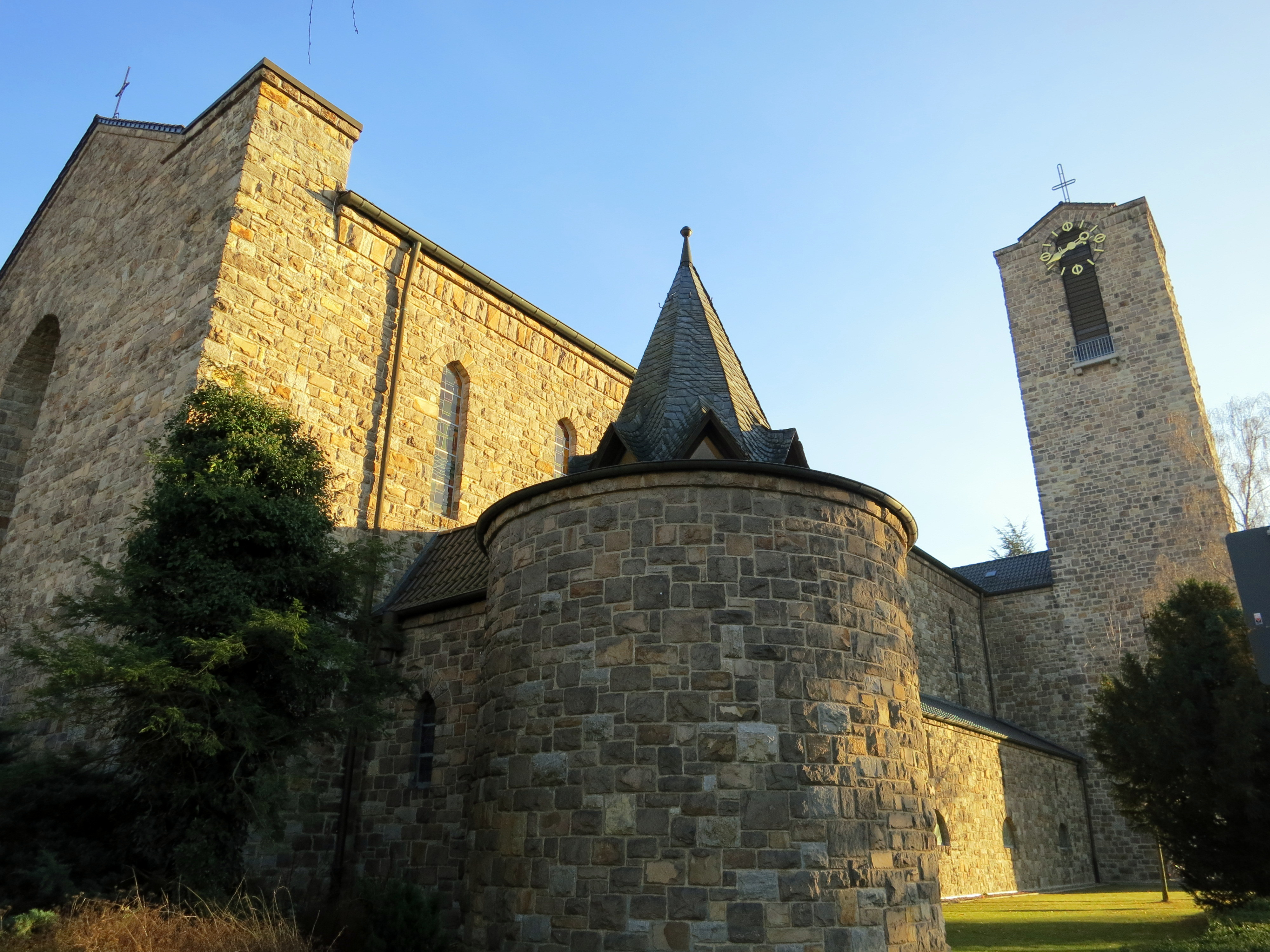 Taufkapelle